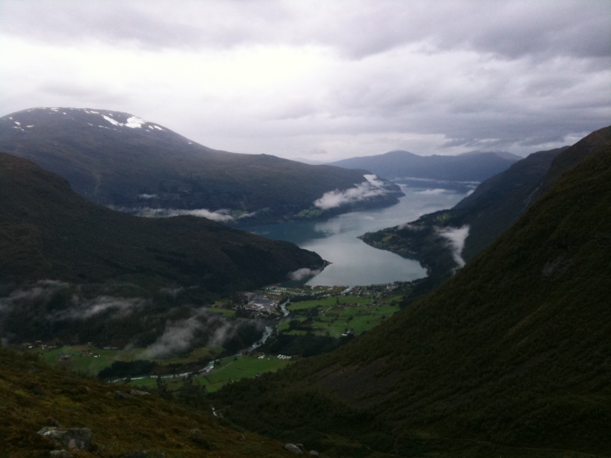 Utsikt over Loen på veg opp Skåla